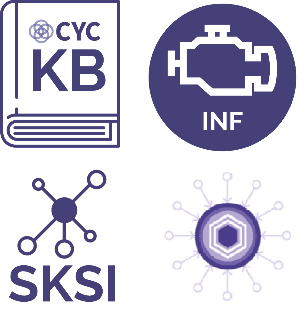 Four Cyc project logos are integrated in this picture.